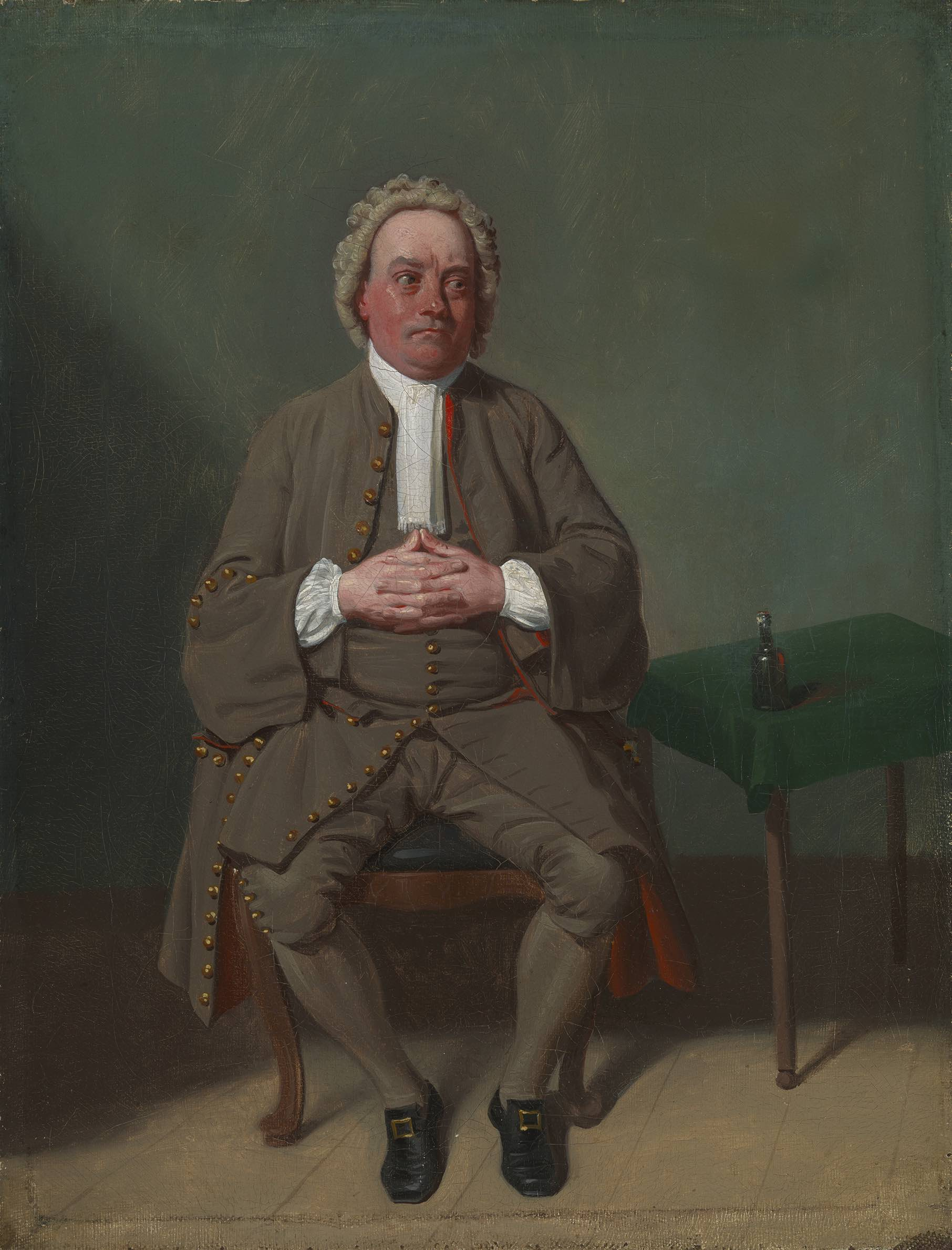 Samuel de Wilde (1751-1832) John Quick dans le rôle de Vellum, 1792 Huile sur toile, 36,8 x 27,9 cm Chicago, The Art Institute Photo : Art Institute